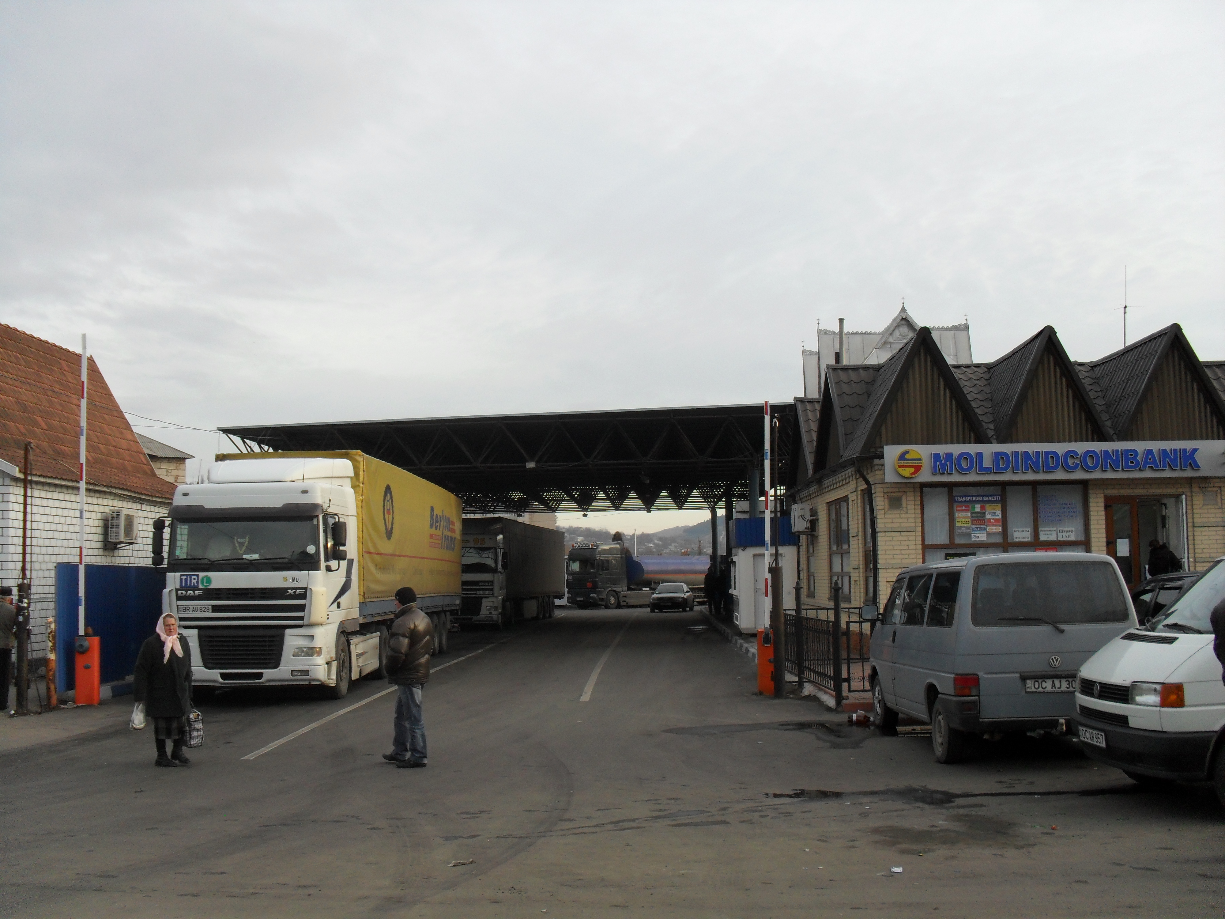 МАПП "Атаки"